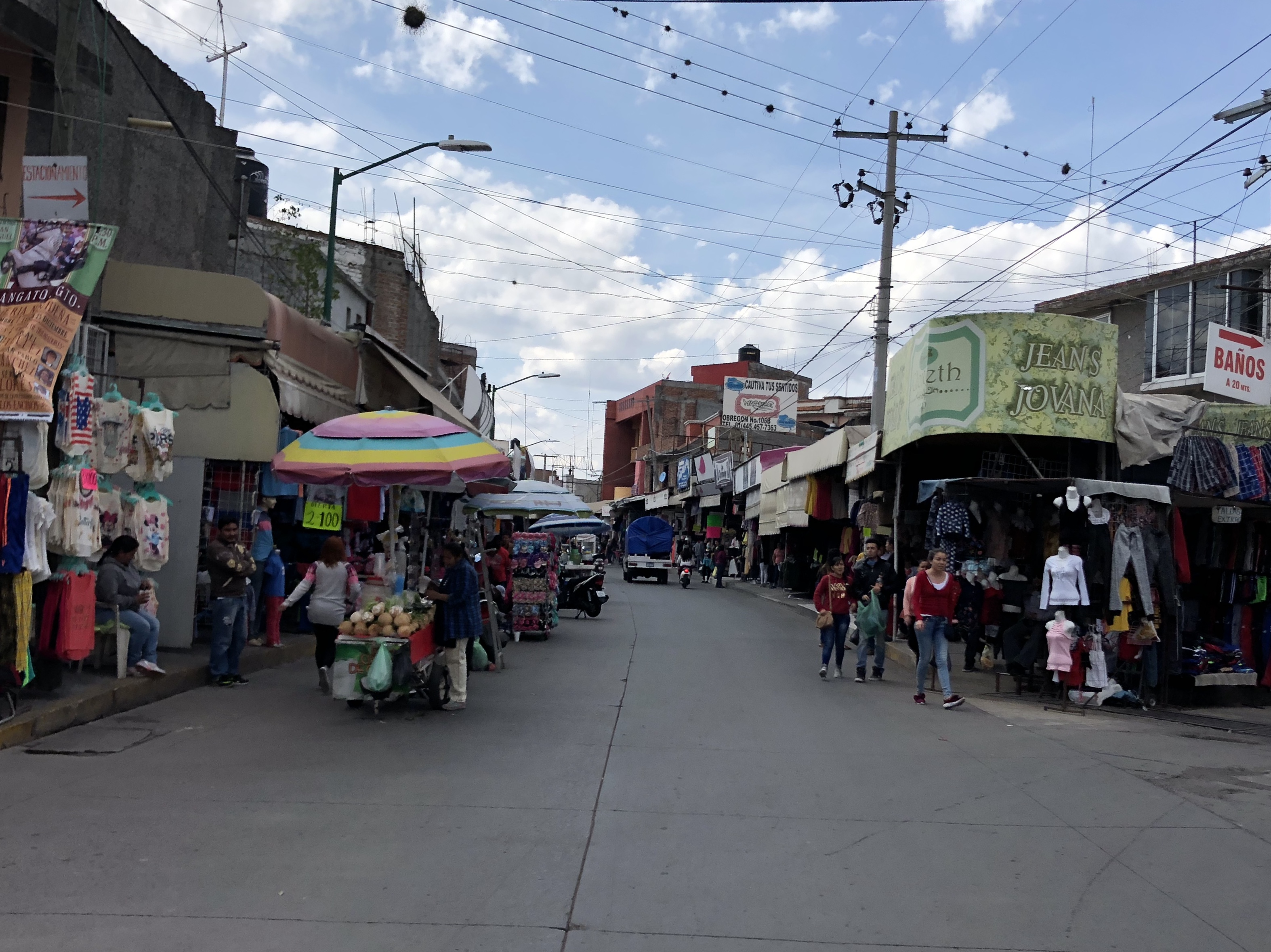 Zona Comercial Textil Uriangato en la Av. Álvaro Obregón, imagen que muestra los puestos de ropa de Uriangato.